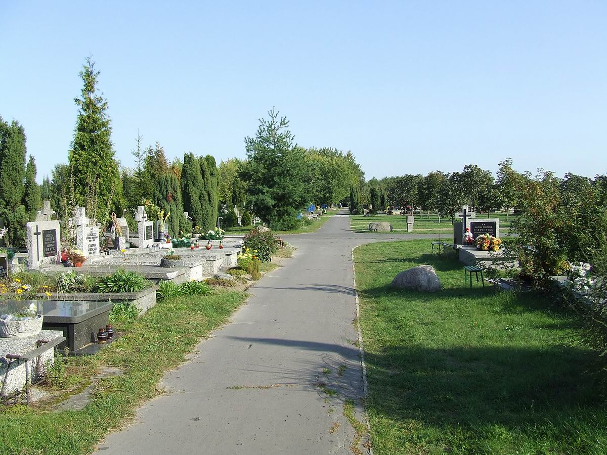 Typowe alejki na Cmentarzu Komunalnym Północnym w Warszawie